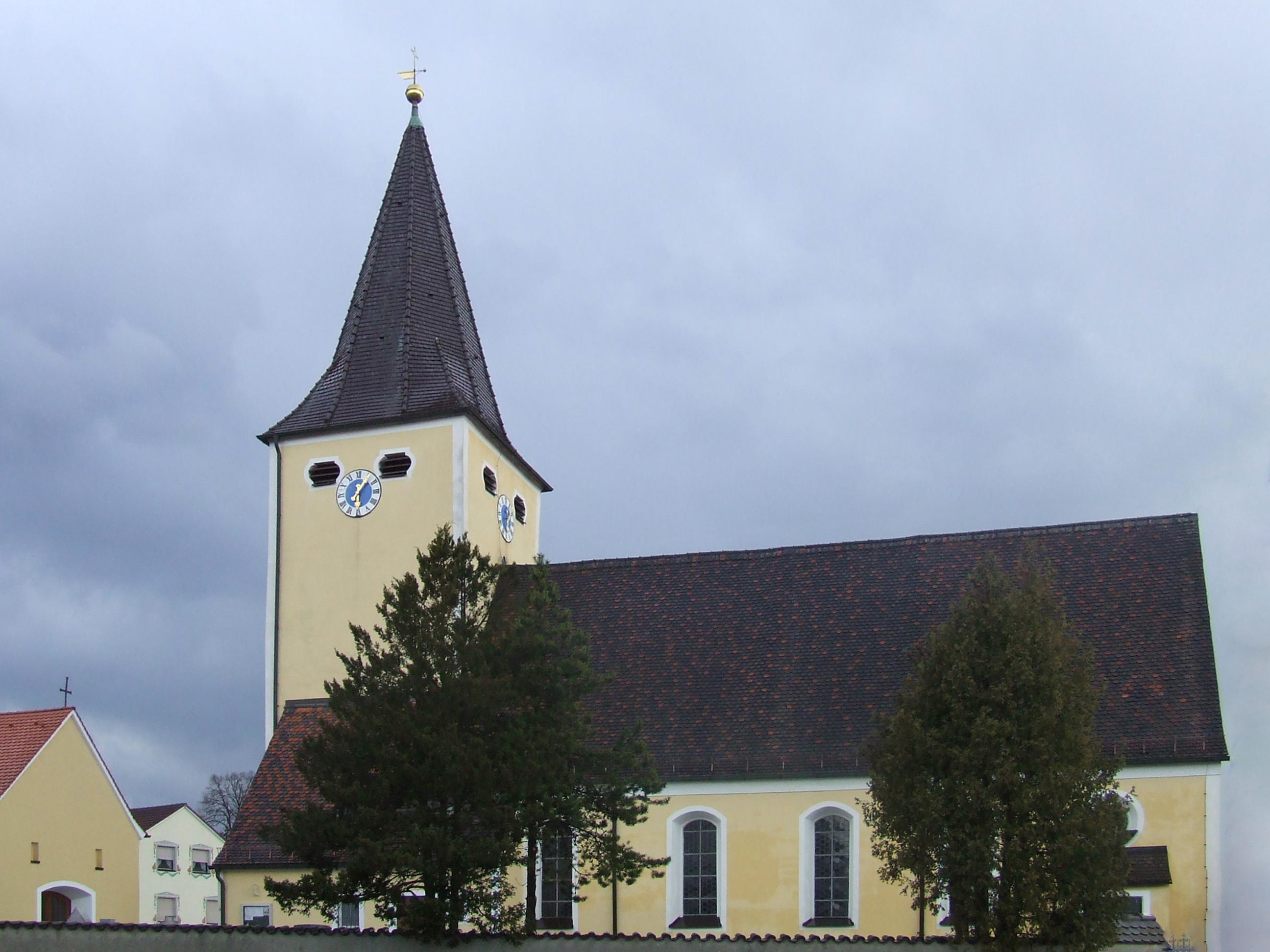 Landkreis Neumarkt in der Oberpfalz, Pilsach, die katholische Kirche St. Peter und Paul von Nordenn